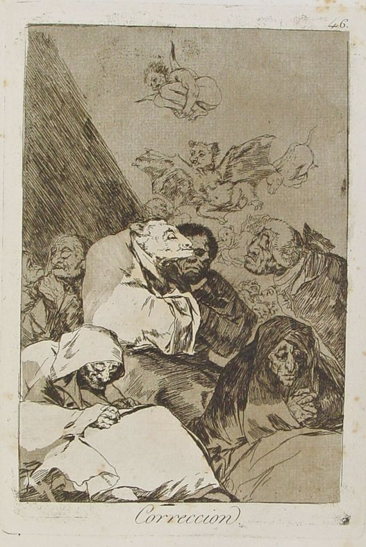 Capricho nº 46: Corrección de Goya, serie Los Caprichos